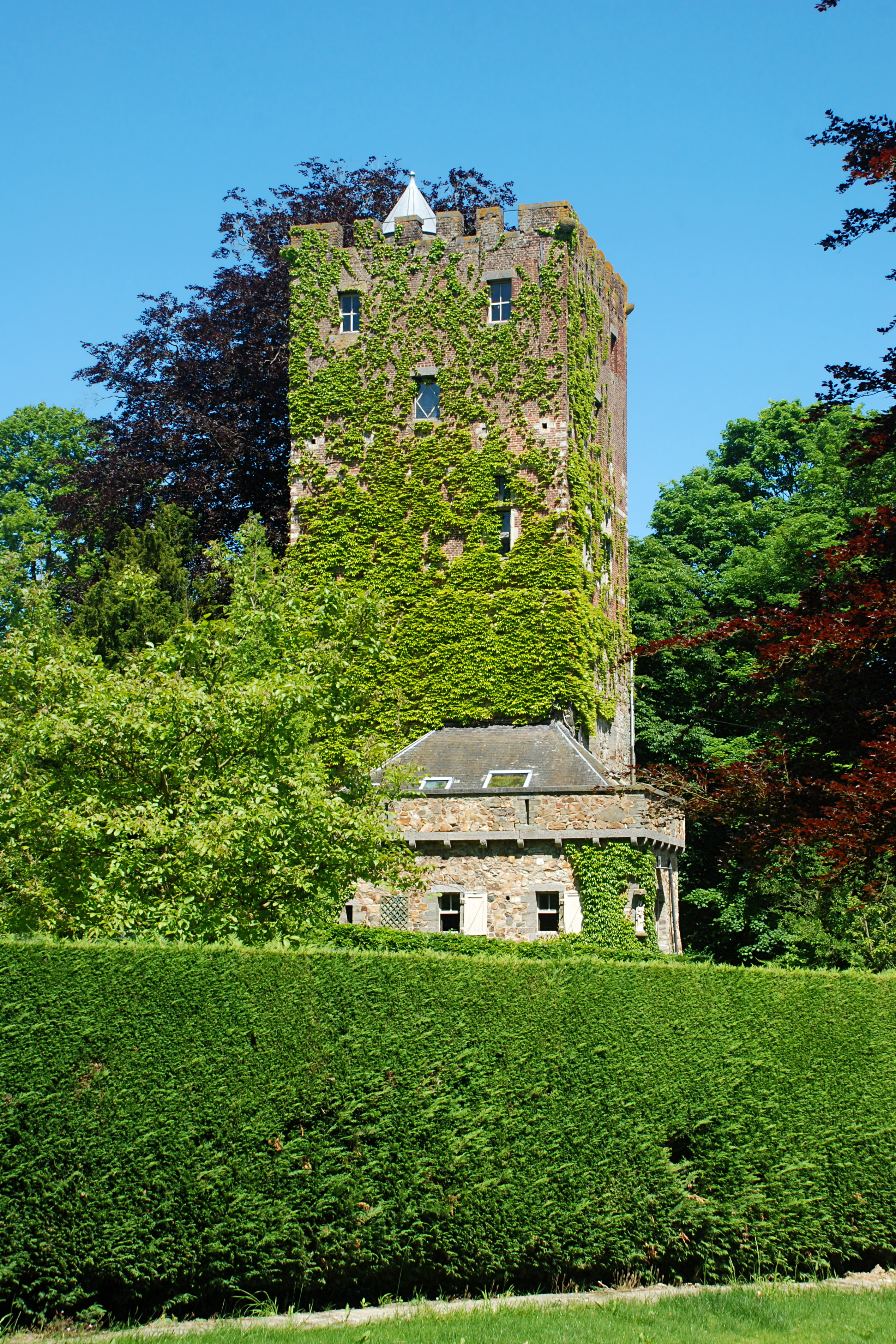 Belgique - Brabant wallon - Mont-Saint-Guibert - Hévillers - Donjon de Bierbais